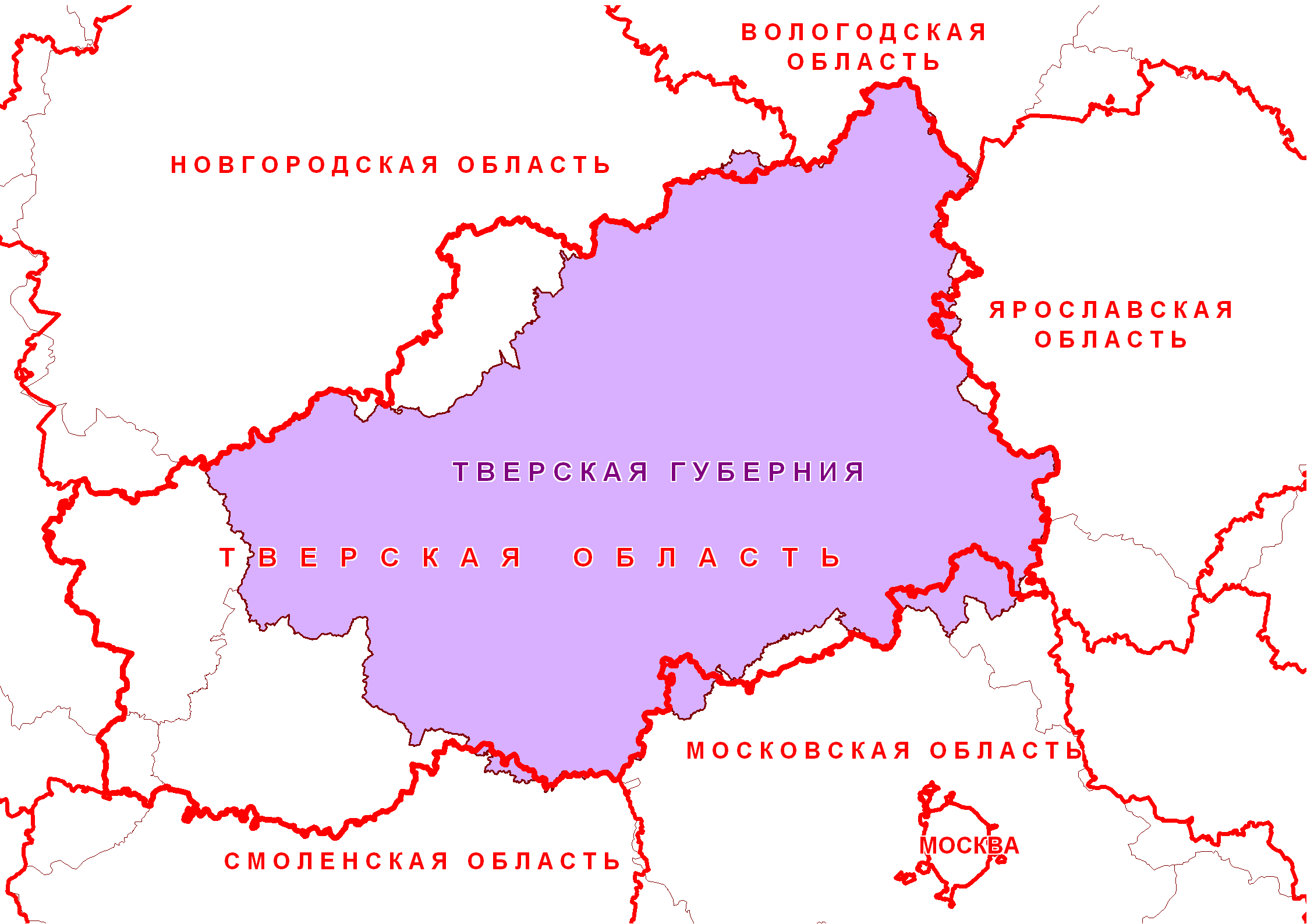 Тверская губерния на фоне Тверской области